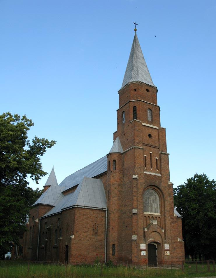 Костел у смт Отинія Коломийського р-ну Ів-Франківської обл.